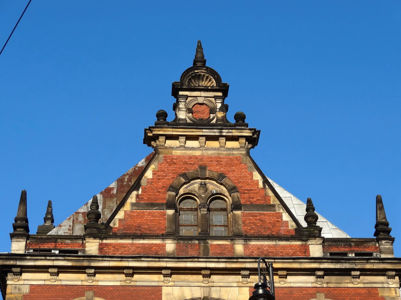 Budynek dawnej dyrekcji Kolei Wschodniej w Bydgoszczy, ul. Dworcowa 63, zbud. 1886-1889, od 2013 r. w gestii Collegium Medicum UMK